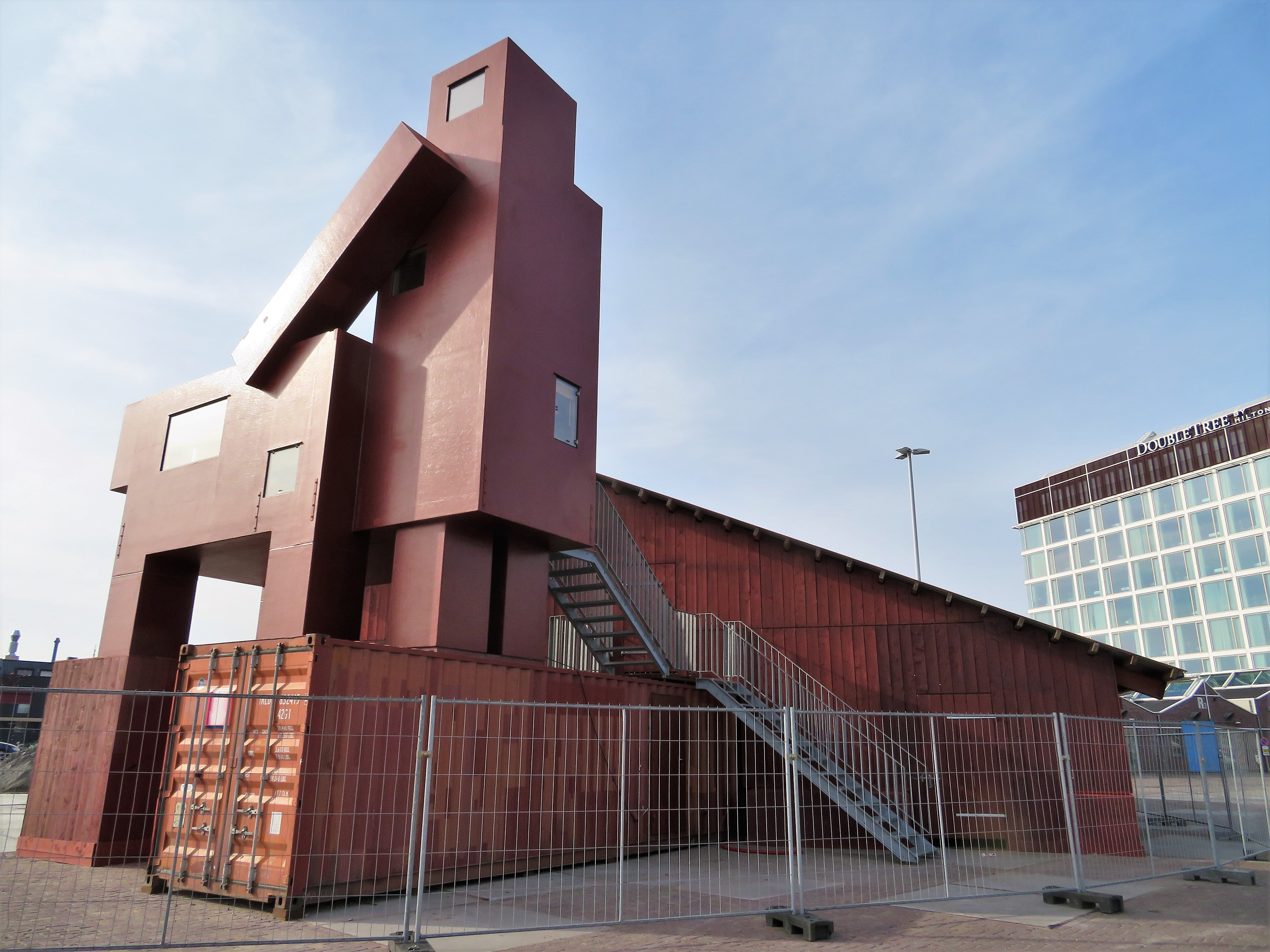 Ferrotopia, kunstproject van Atelier van Lieshout, in 2018 op het NDSM terrein in Amsterdam-Noord